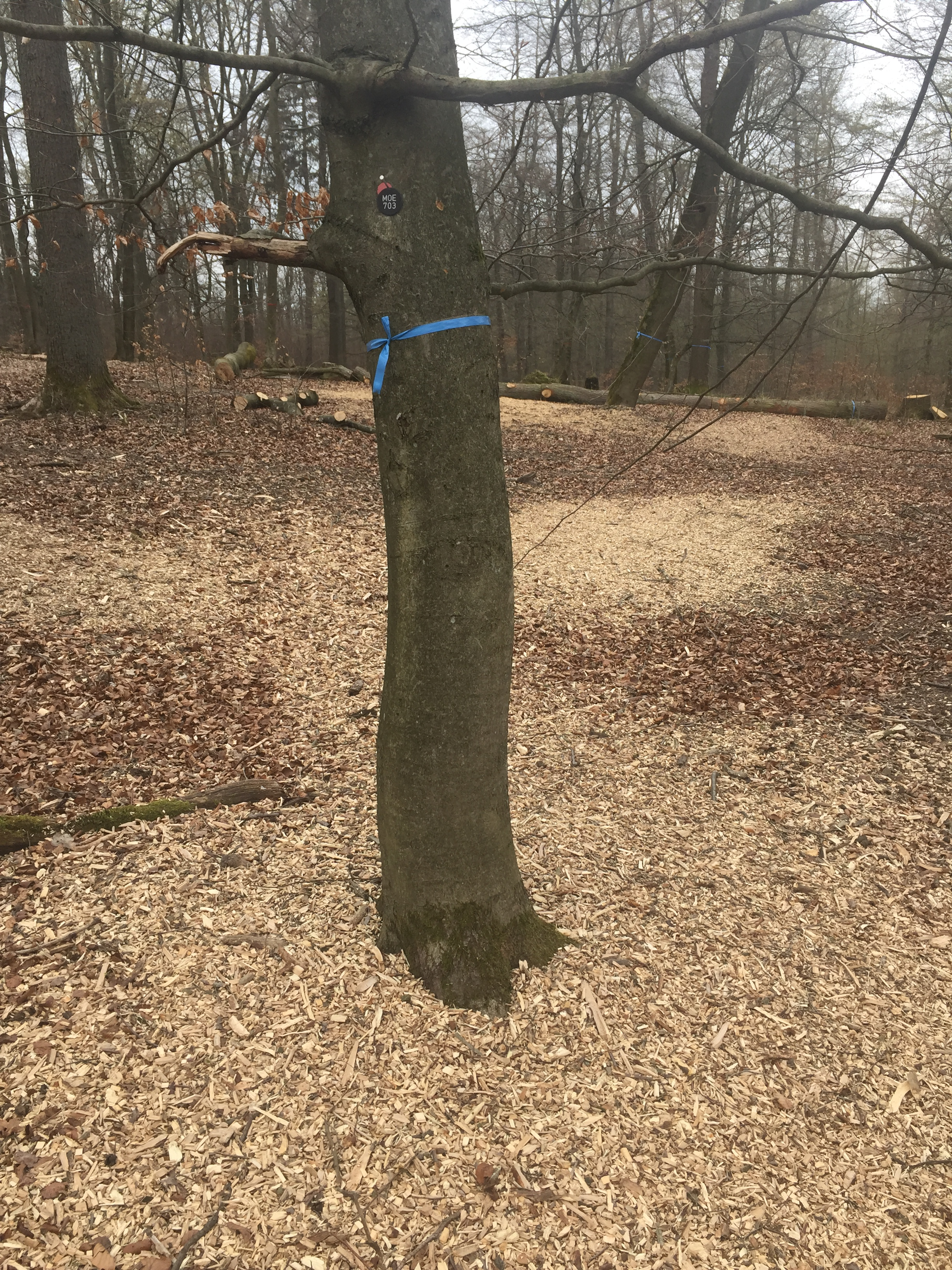 Umwandlung Wald zu Friedwald